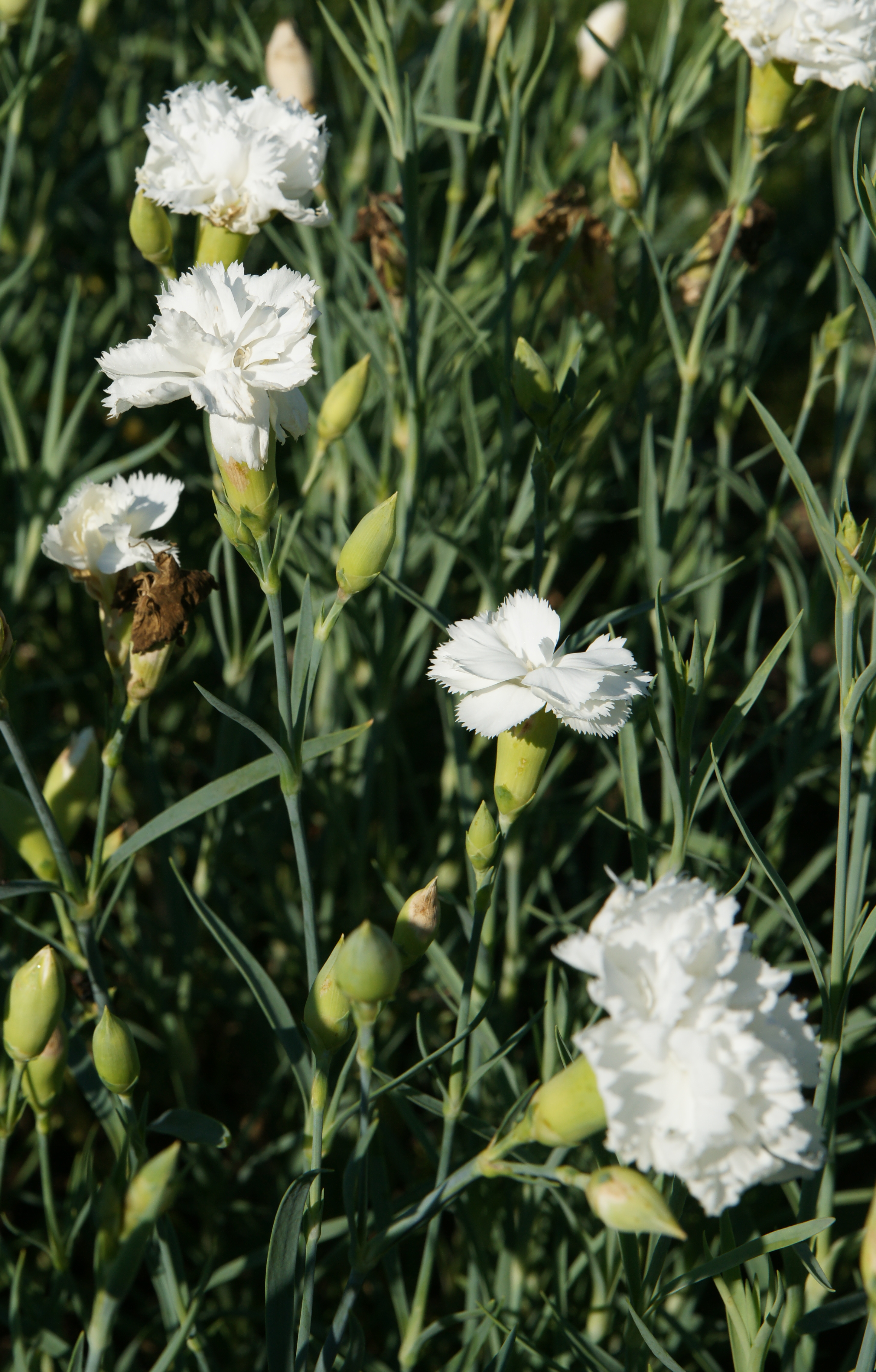 Dianthus caryophyllus (Garten-Nelke) 'Jeanne Dionis' (1934). ProSpecieRara-Zierpflanzengarten Elfenau Bern.